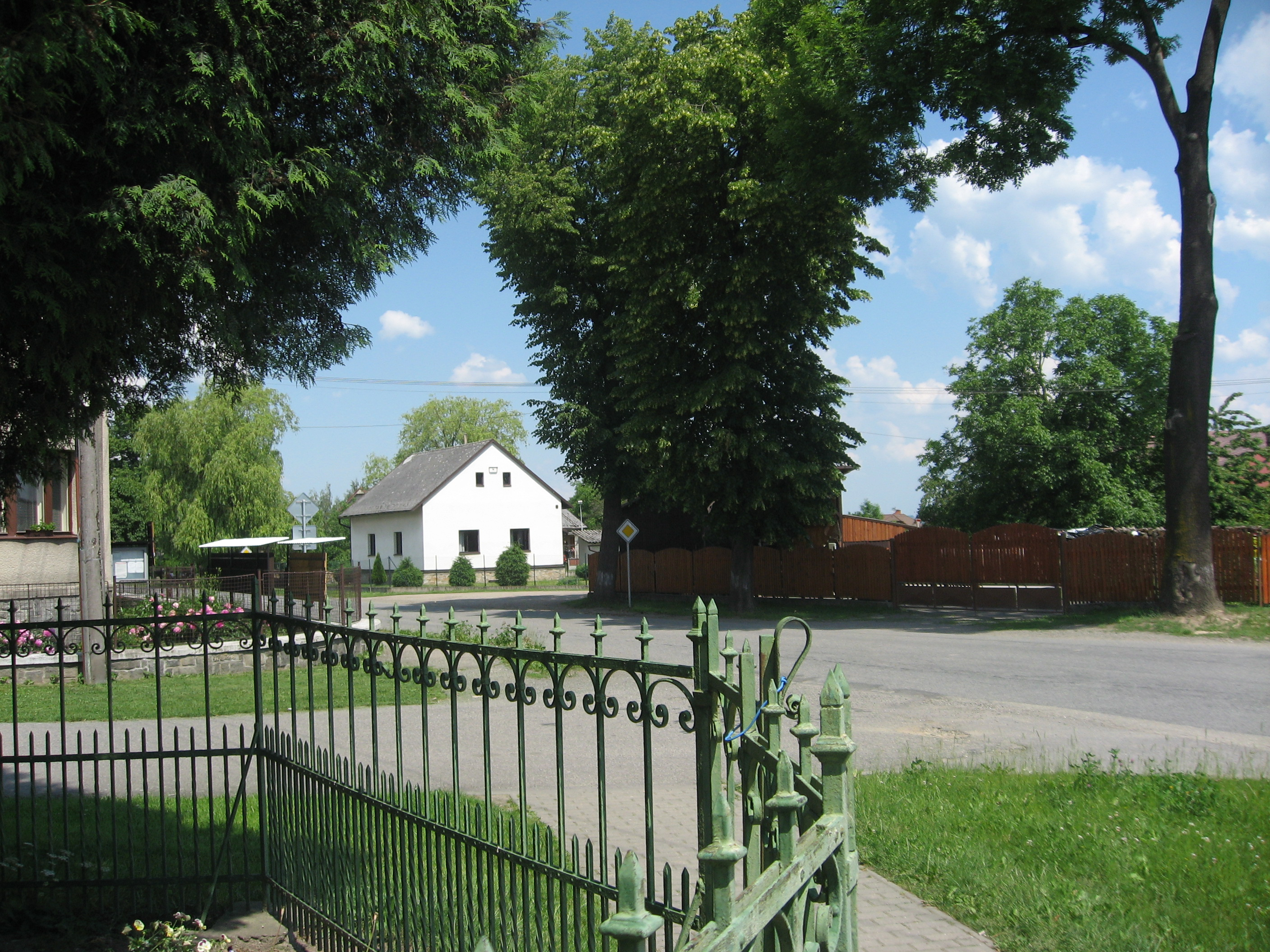 Lípa, okres Havlíčkův Brod